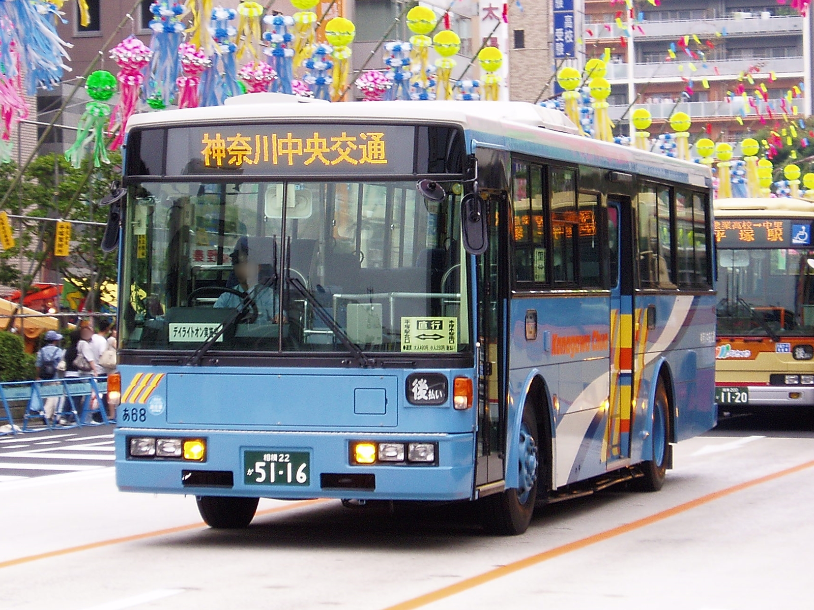 Kanachu A68（あ68） Nissan Diesel KC-UA460LAN at Hiratsuka Sta.